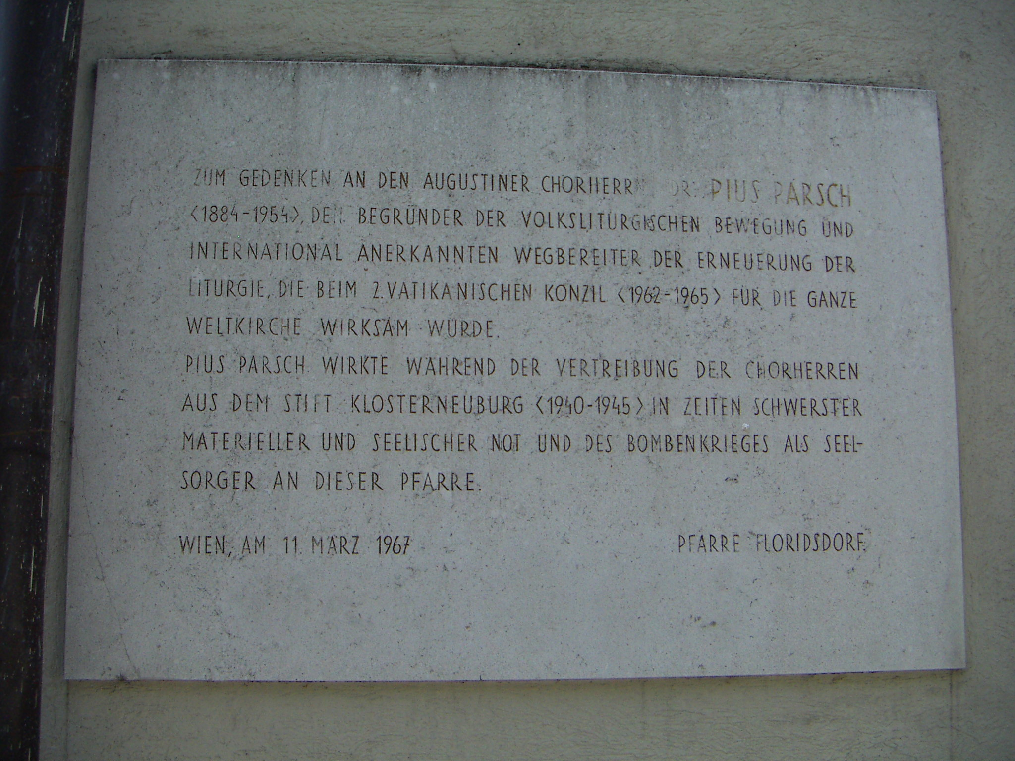 Pfarrkirche Floridsdorf, Gedenktafel an der Aussenwand der Kirche, zu Pater Pius Parsch, welcher in dieser Kirche Kaplan war, und die liturgische Erneuerung vorbereitet hat.